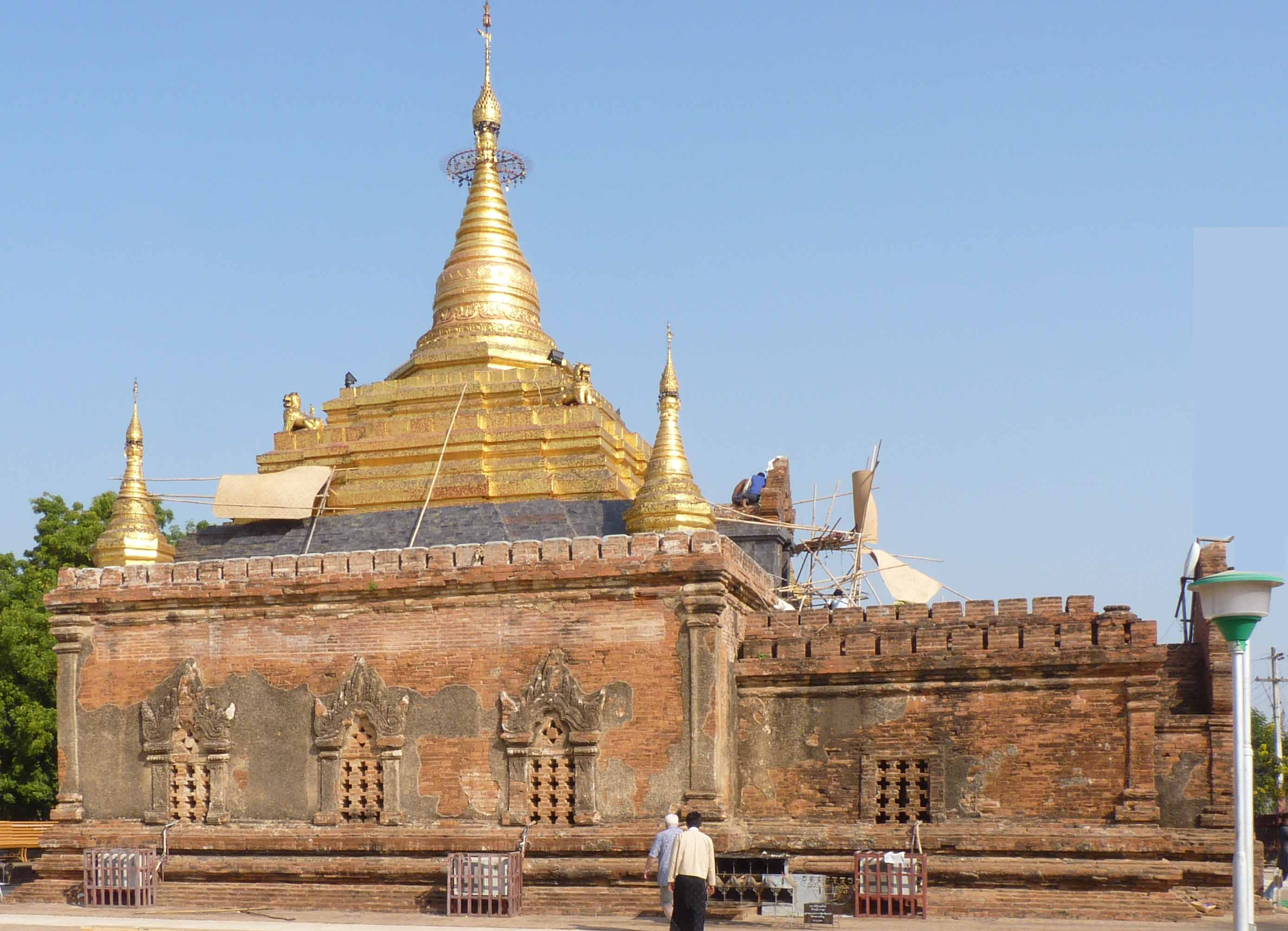 Vue extérieure du temple, avec restaurations récentes